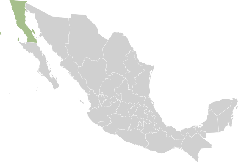 Map localizing Baja California.